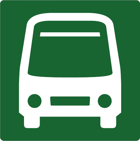 Icono del Alimentador